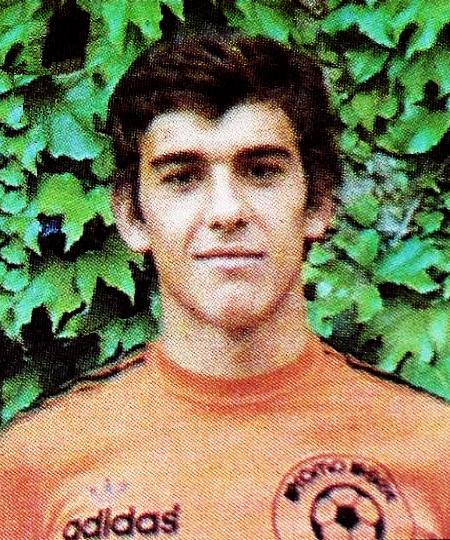 Gilles Brisson en 1978 (US Toulouse), 'Panini Football 1978 - 1979', Panini figurina n°429.